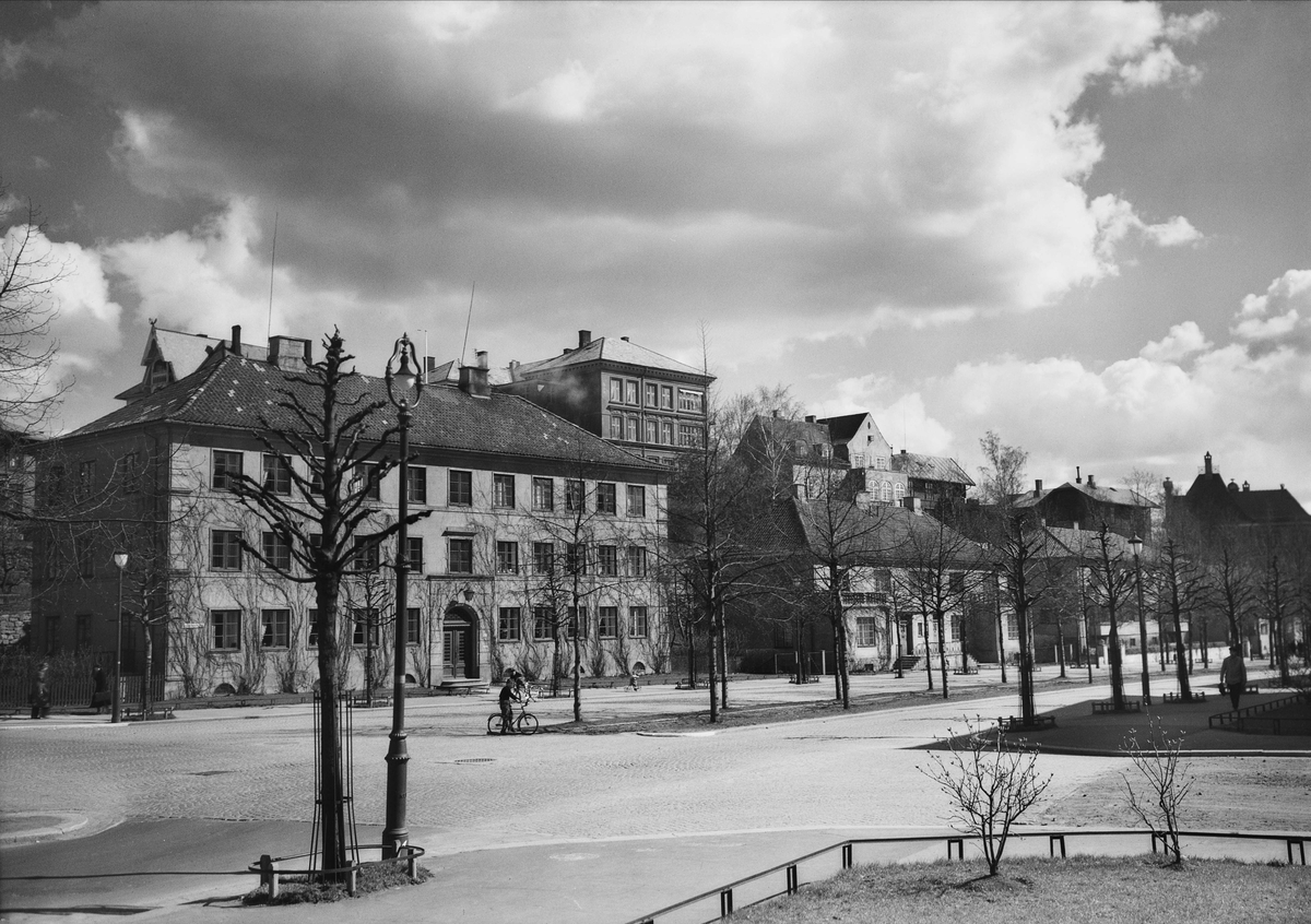 Gyldenløves gate med ridestien. Bygningen i forgrunnen er nr. 13. Foto: Anders Beer Wilse (1939). Fra Byhistorisk samling hos Oslo Museum.